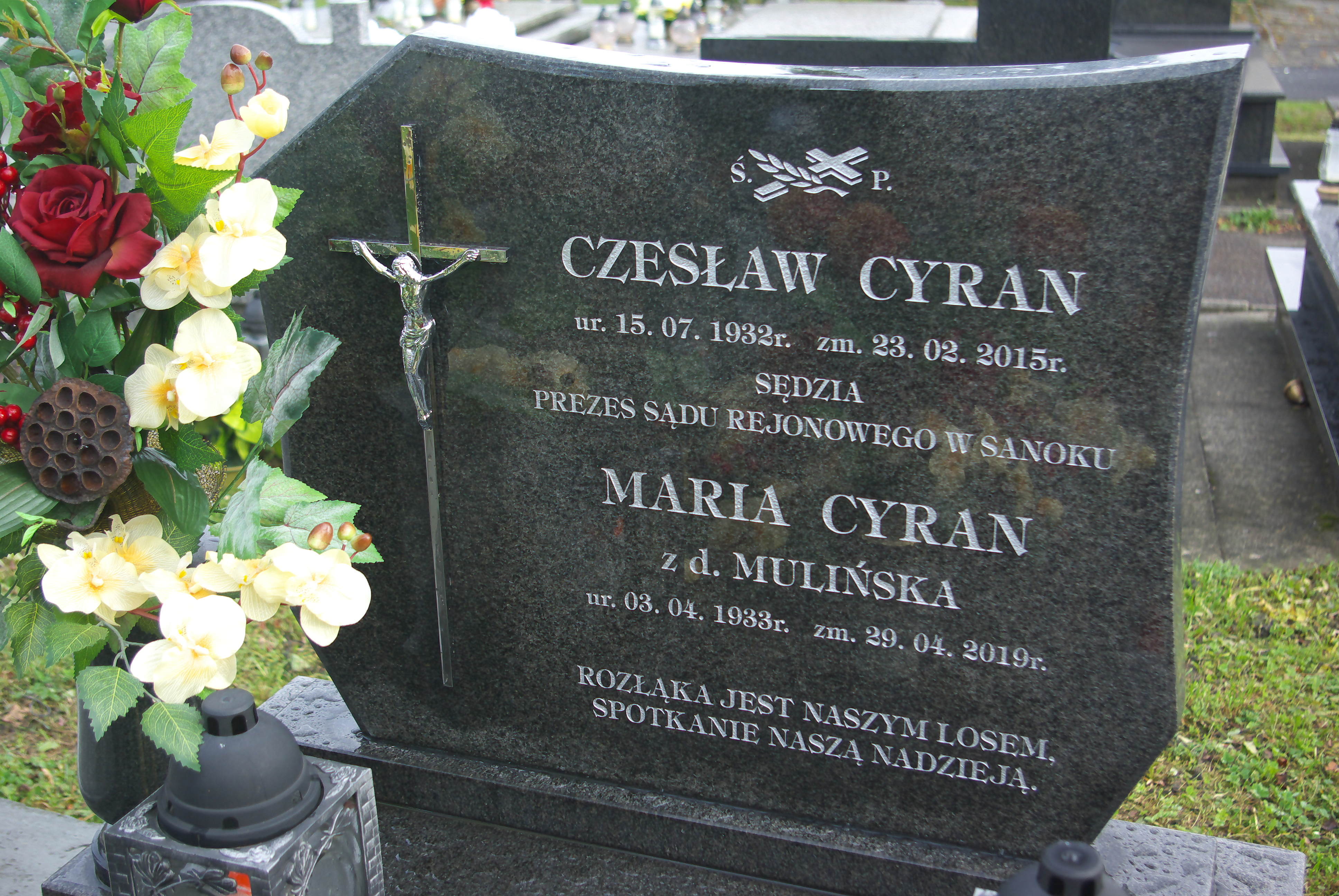 Nagrobek Czesława i Marii Cyranów na Cmentarzu Centralnym w Sanoku.